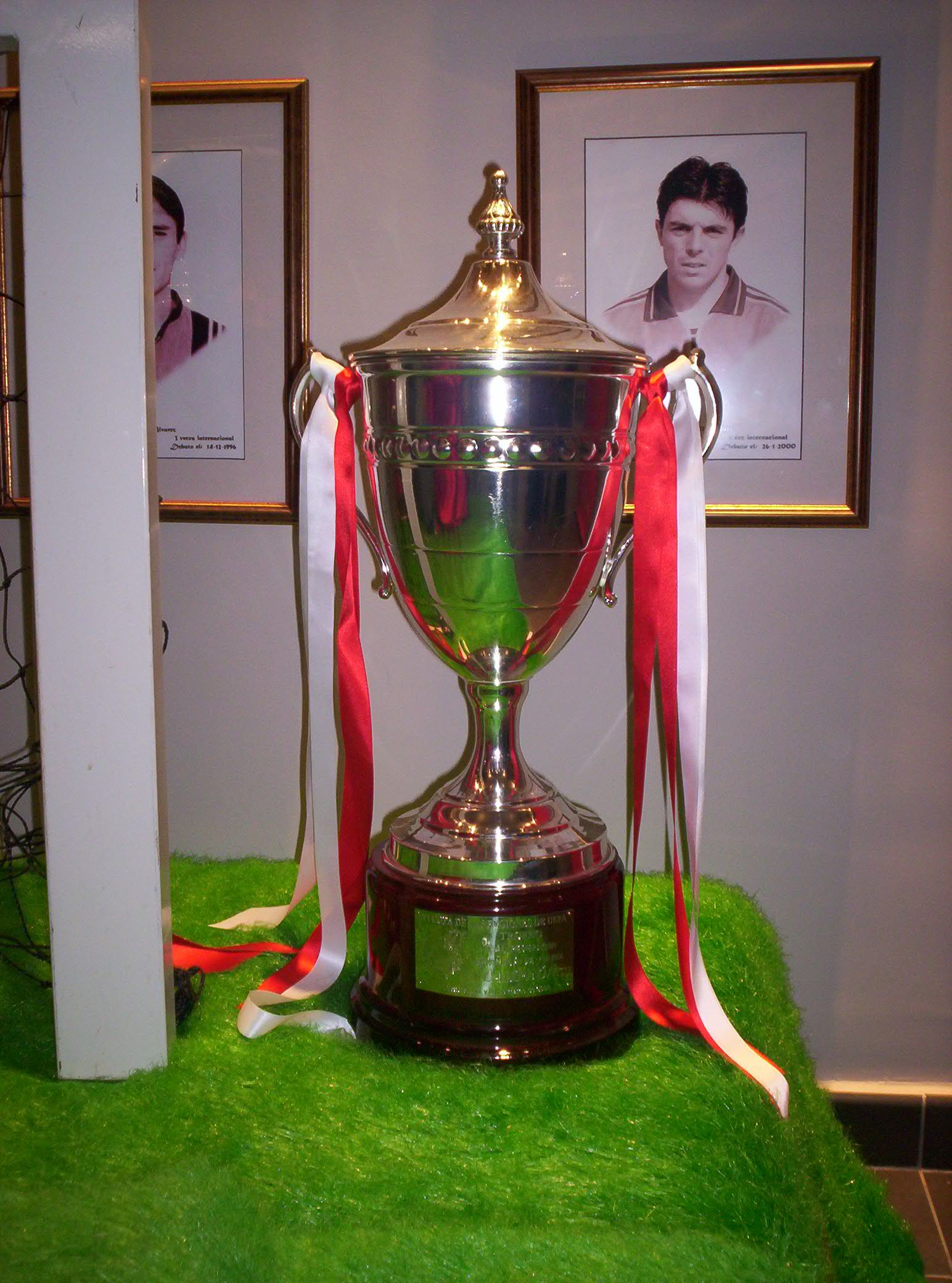 Trofeo de campeón de la fase española de la Copa de las Regiones de fútbol